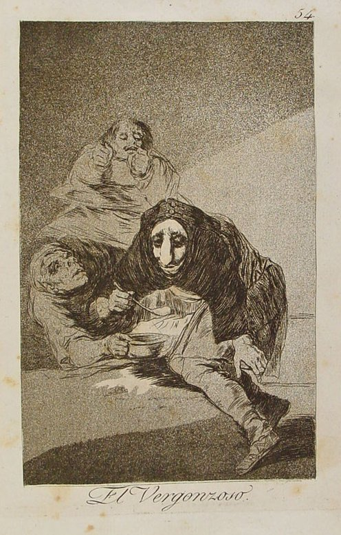 Capricho nº 54: El vergonzoso de Goya, serie Los Caprichos